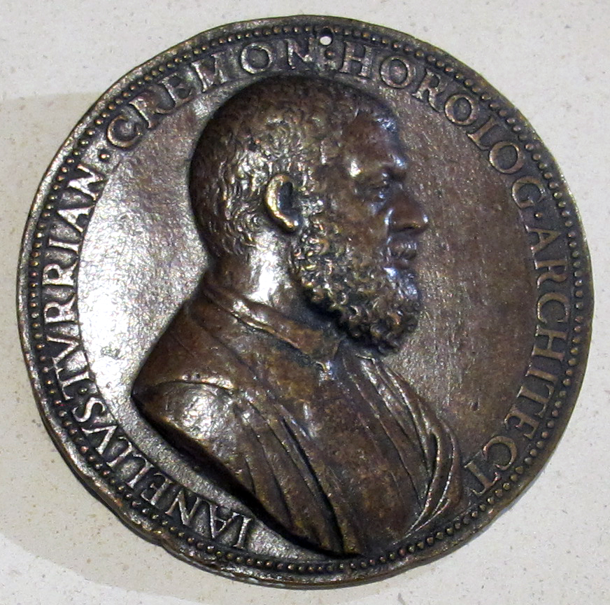 Petit Palais, Parigi